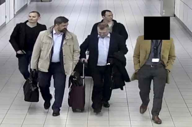 Quatre officiers russes de la Direction générale de l'état-major général des forces armées de la Fédération de Russie, GRU, sont escortés jusqu'à leur vol après avoir été expulsés des Pays-Bas pour avoir prétendument tenté de pirater le réseau de l'OIAC en matière de surveillance chimique des Nations Unies. (Photo du ministère néerlandais de la Défense via AP)